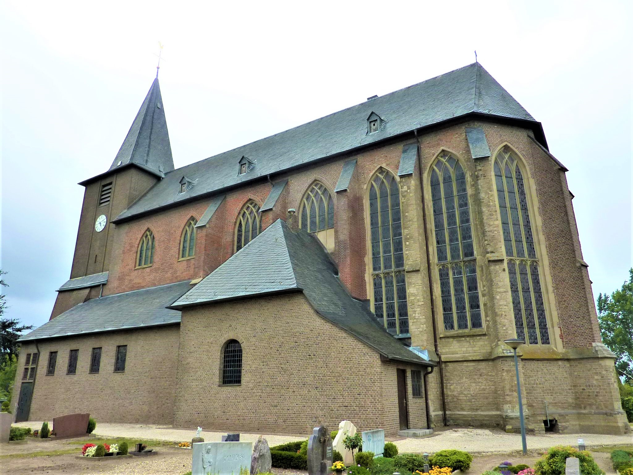 Saint Martin Church (Zyfflich)